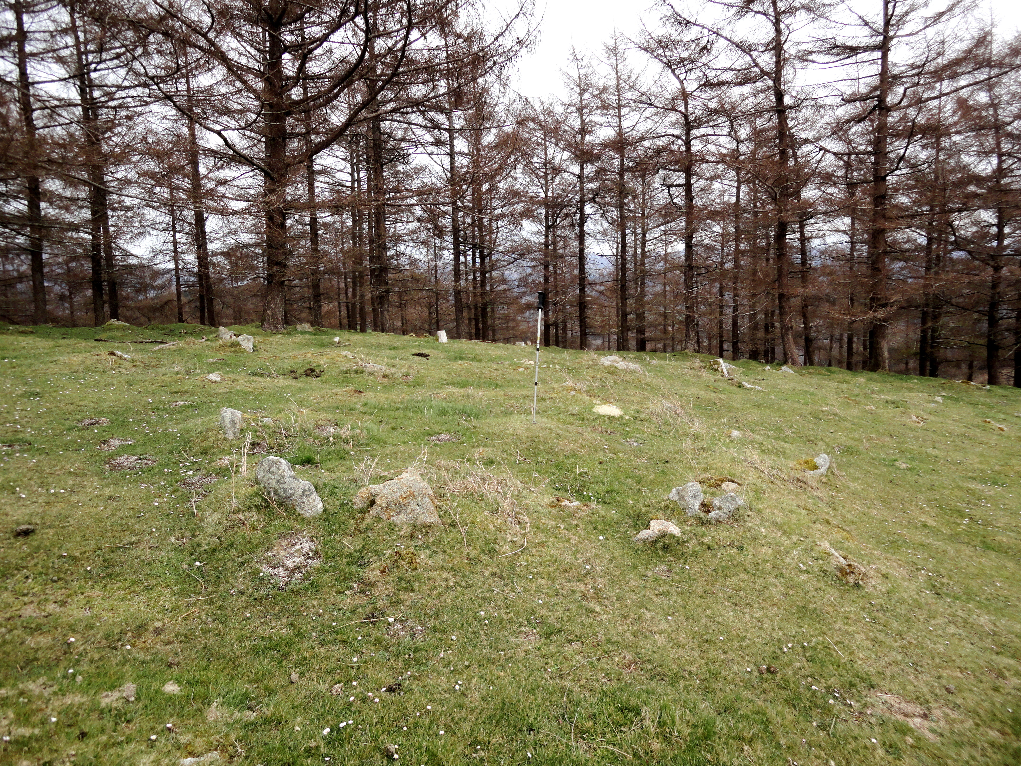 Agina Ipar harrespilak